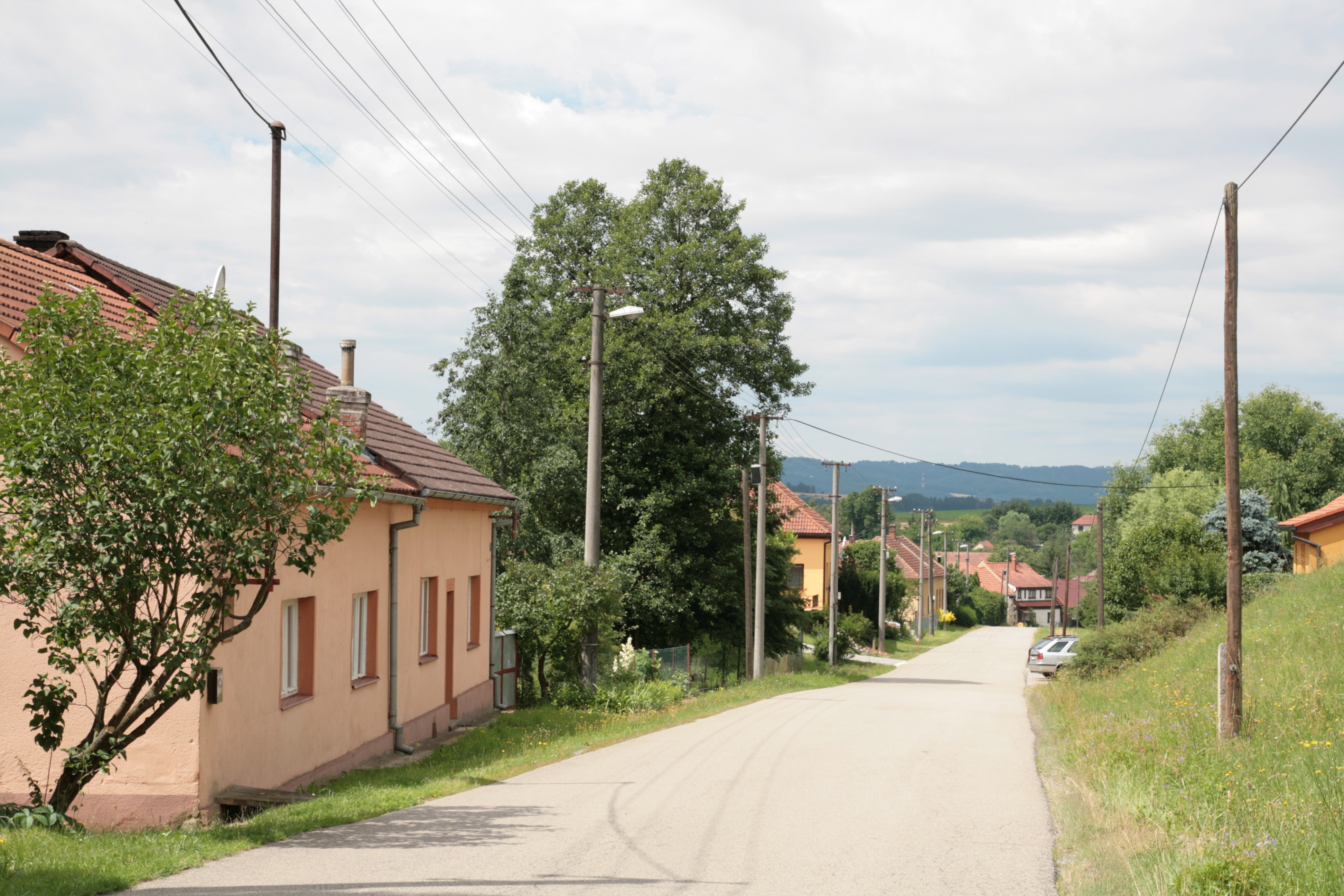 Vesnice Kladoruby, část města Letovice v okrese Blansko. Průhled ulicí od východu k západu. V popředí vlevo dům čp. 40.